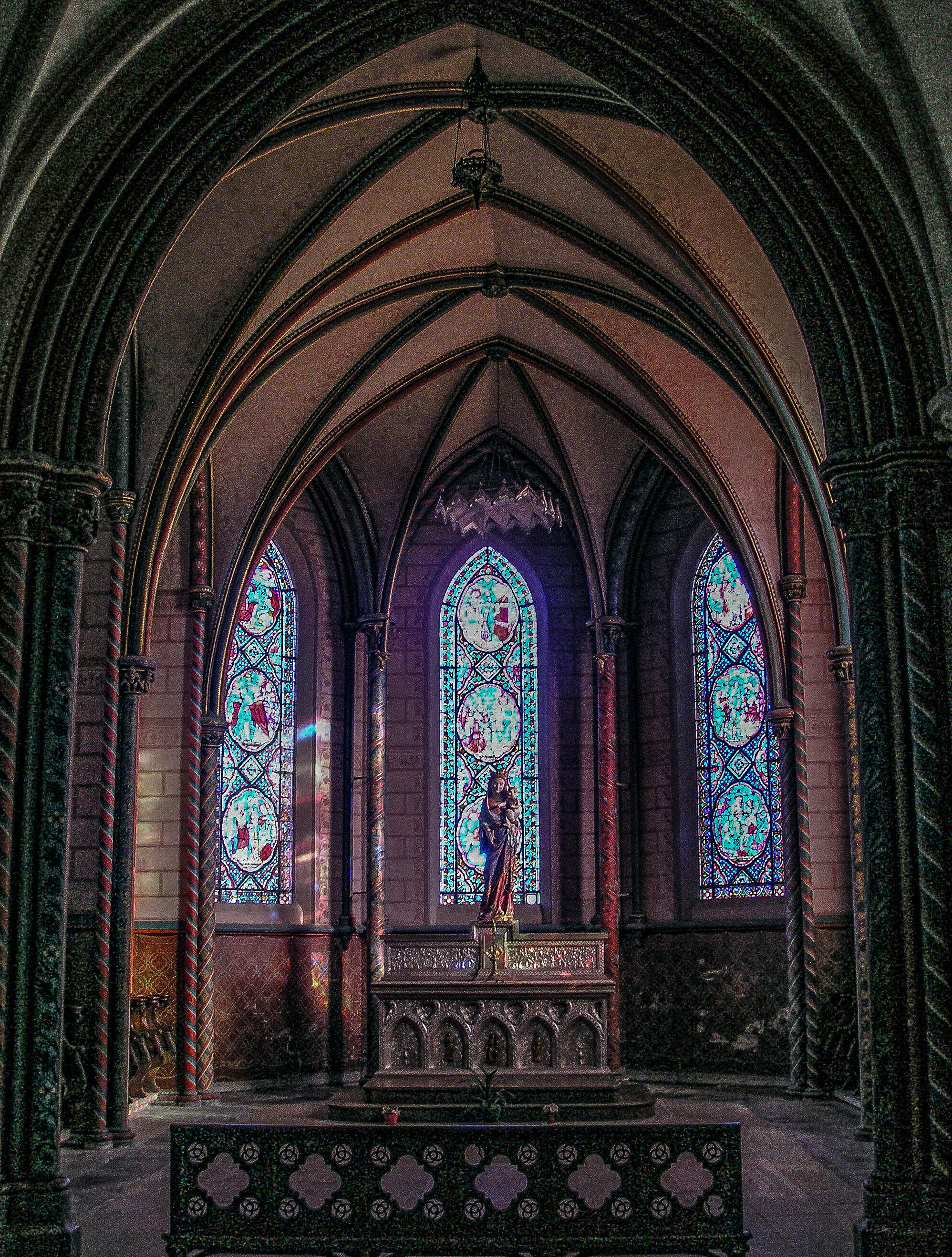 Coutances (Normandie, France). La chapelle absidiale de la cathédrale Notre-Dame.